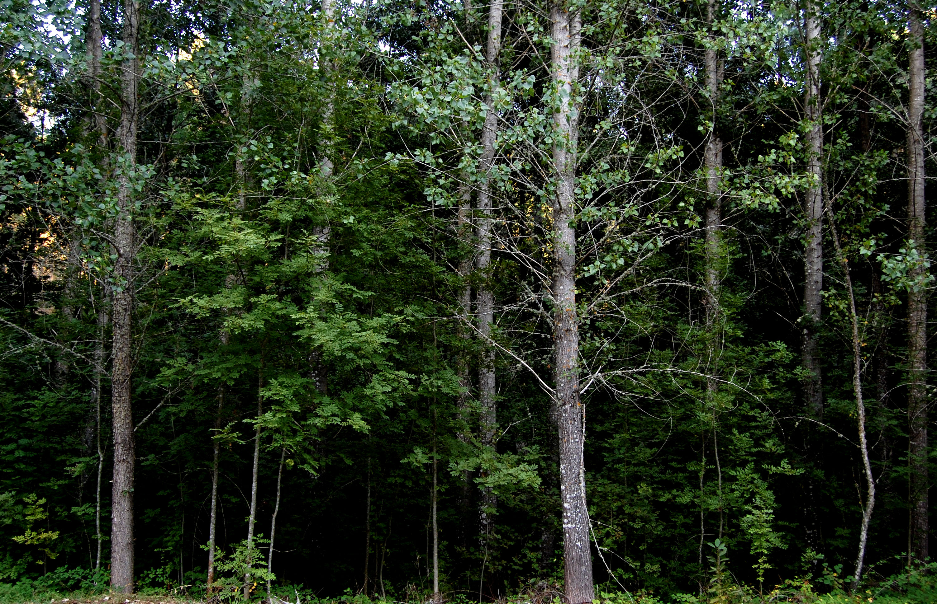 Arboleda en el camino a la ermita de San Pedro de Alcántara, en Arenas de San Pedro (Ávila, España).